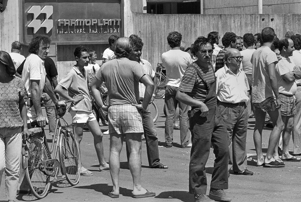 Cittadini di Massa (MS) si radunano davanti ai cancelli dello stabilimento Farmoplant per ottenere notizie sull'incendio del 17 luglio 1988